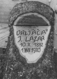 l'inscription tombale de Lazar Drljaca